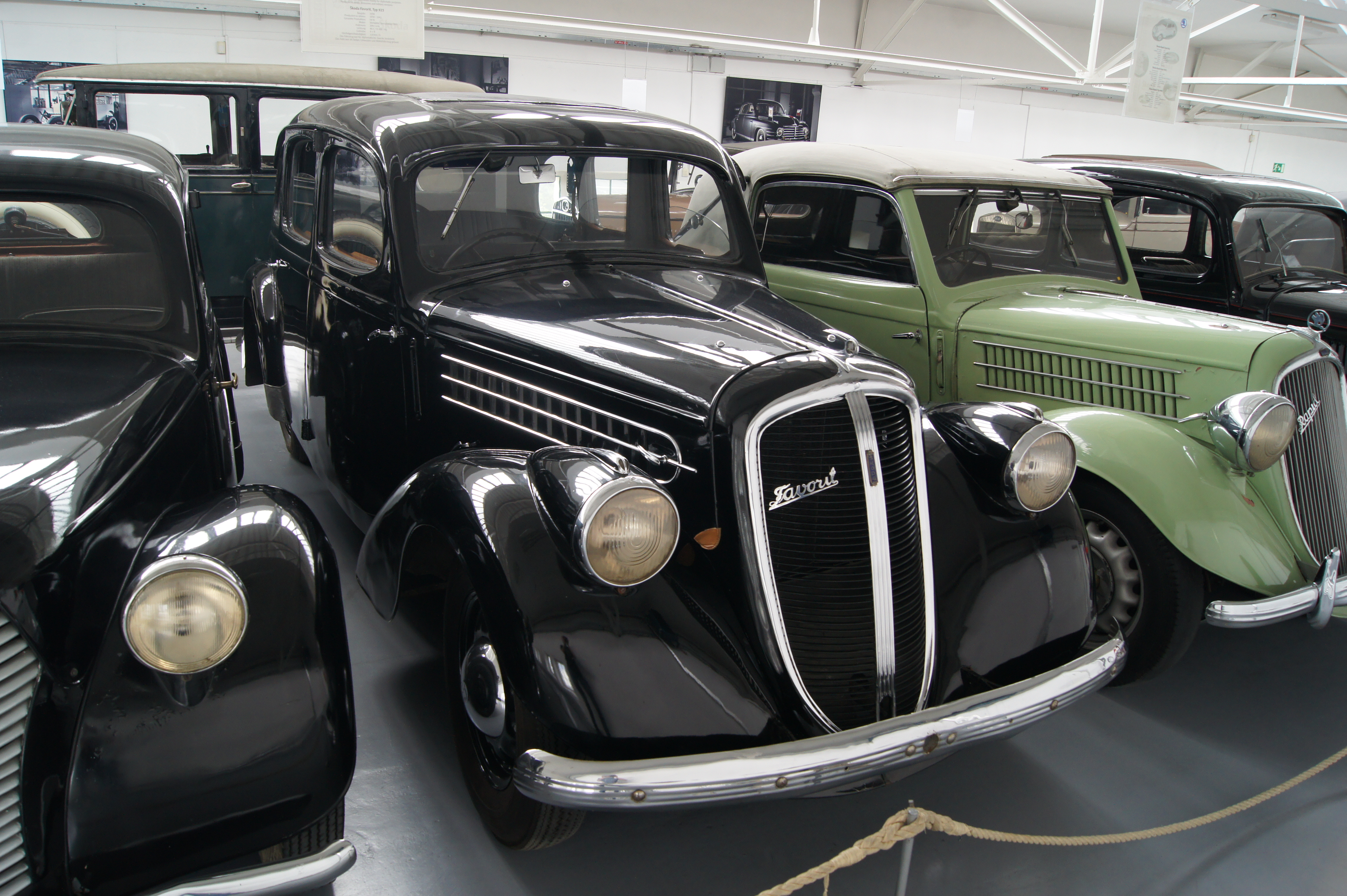 Škoda Favorit (typ 923) z 1938 roku w Muzeum Škody (Mladá Boleslav)